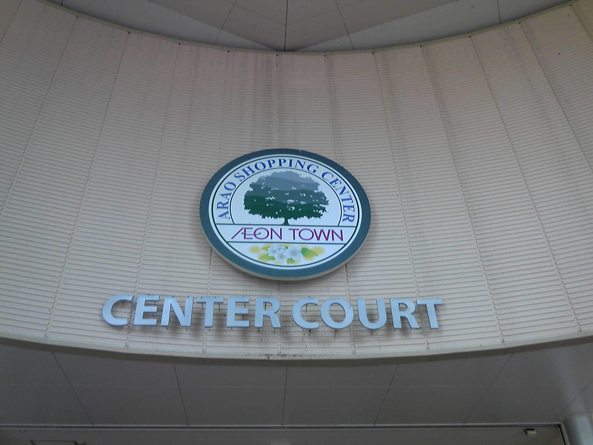 イオンタウン荒尾（熊本県荒尾市）の正面玄関にある看板